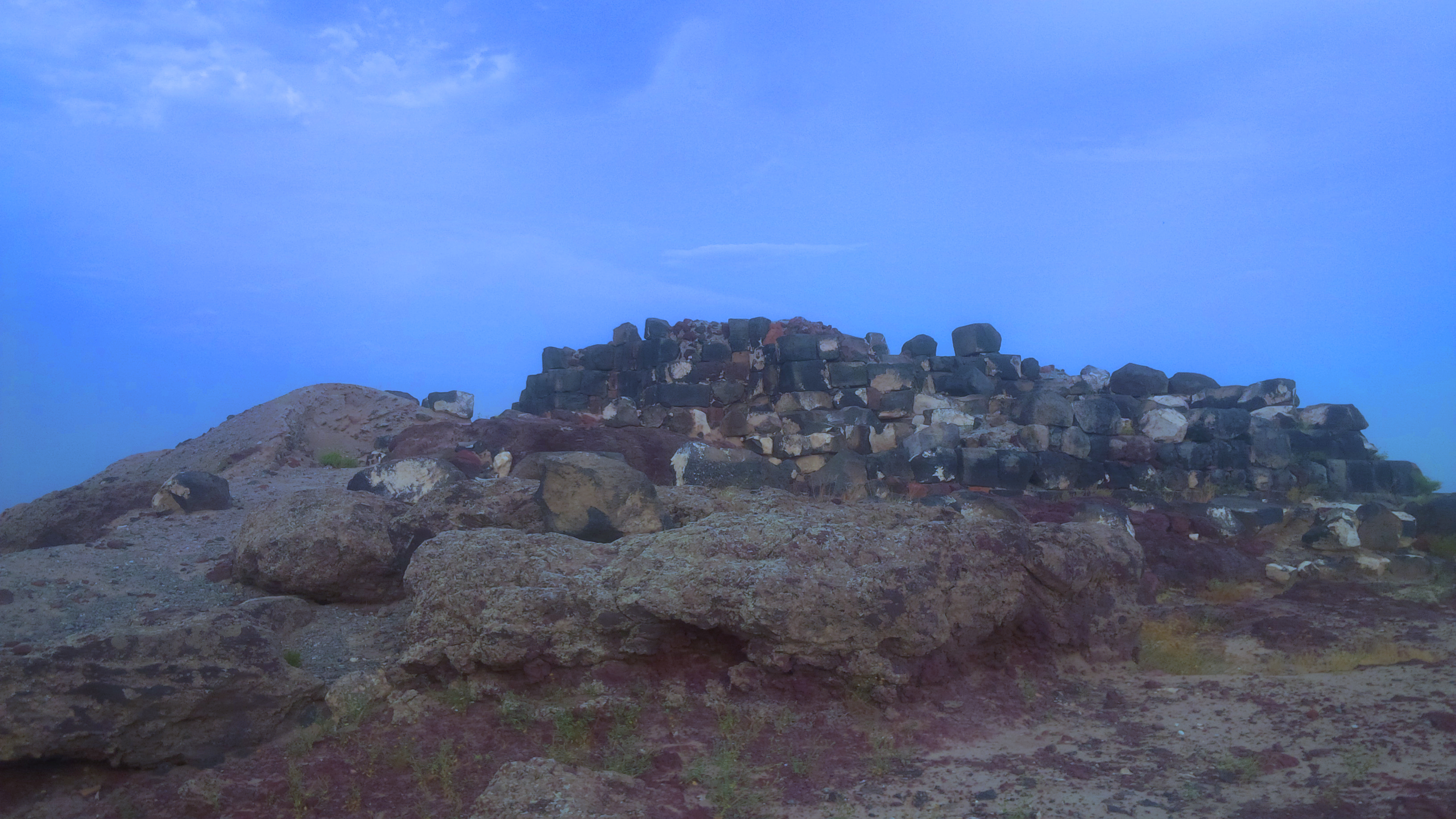 Armenian Ancient capital Armavir, Armenian godness Anahit's temple ruins